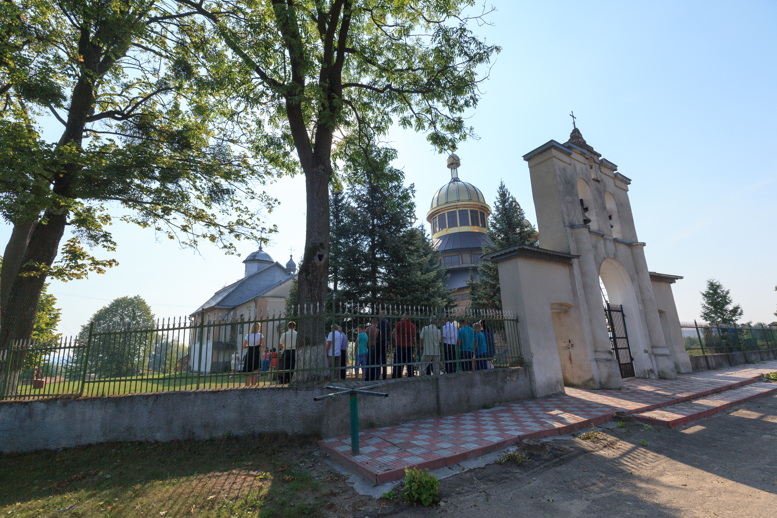 Дзвіниця церкви Св.Миколая(дер.), с.Краковець